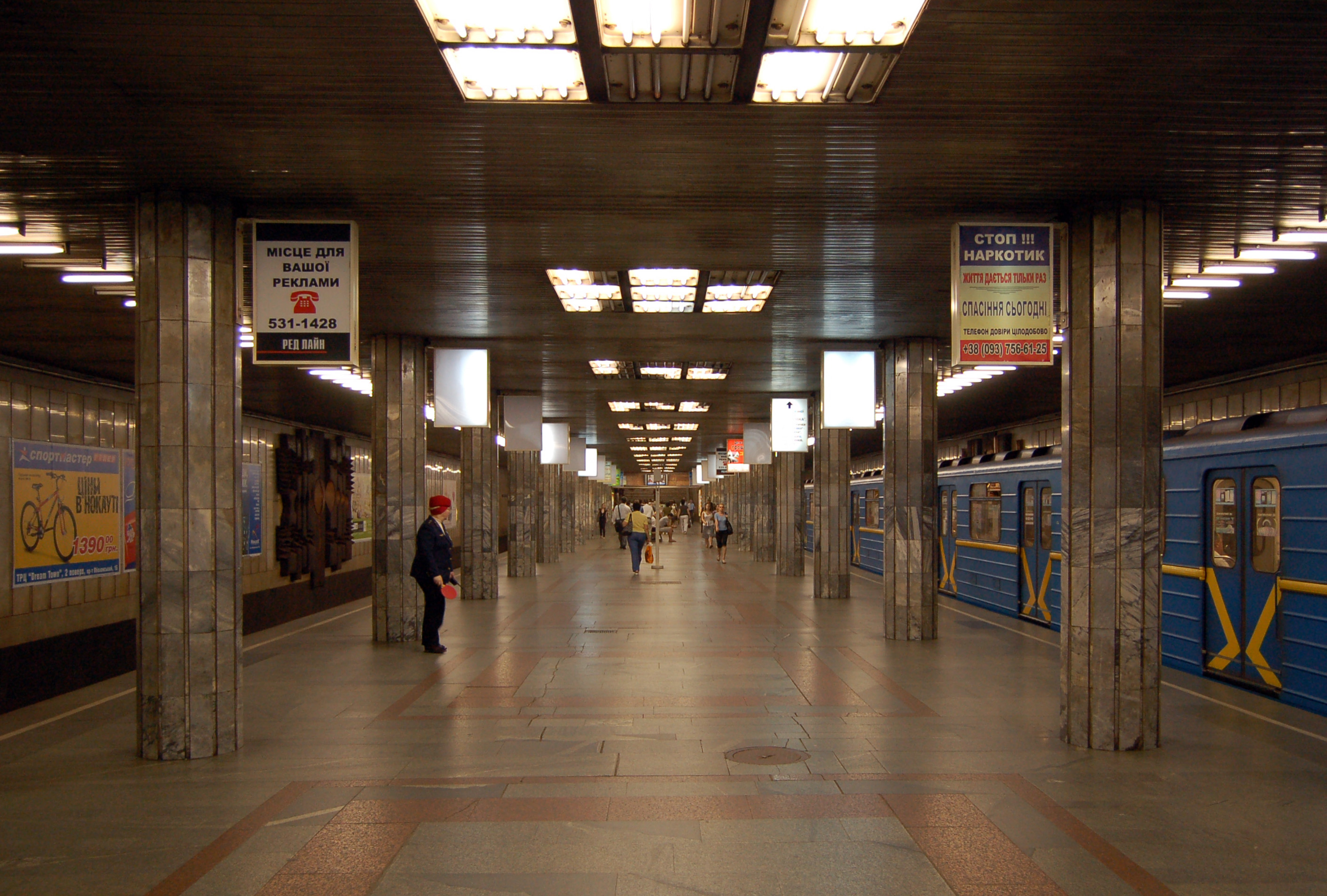 Cтанция метро «Почайна», центральный зал